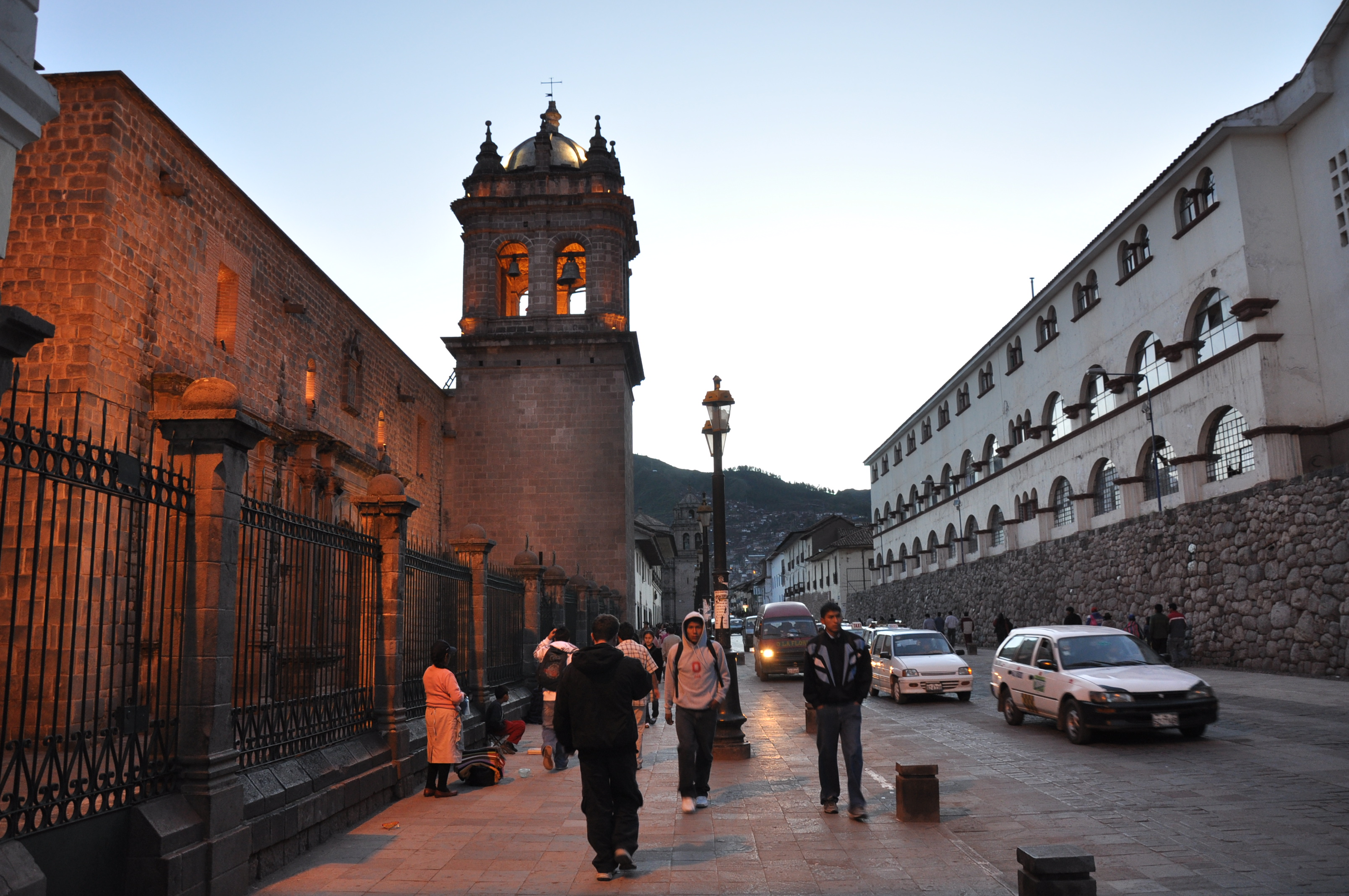 Cuzco at dusk [Cuzco]